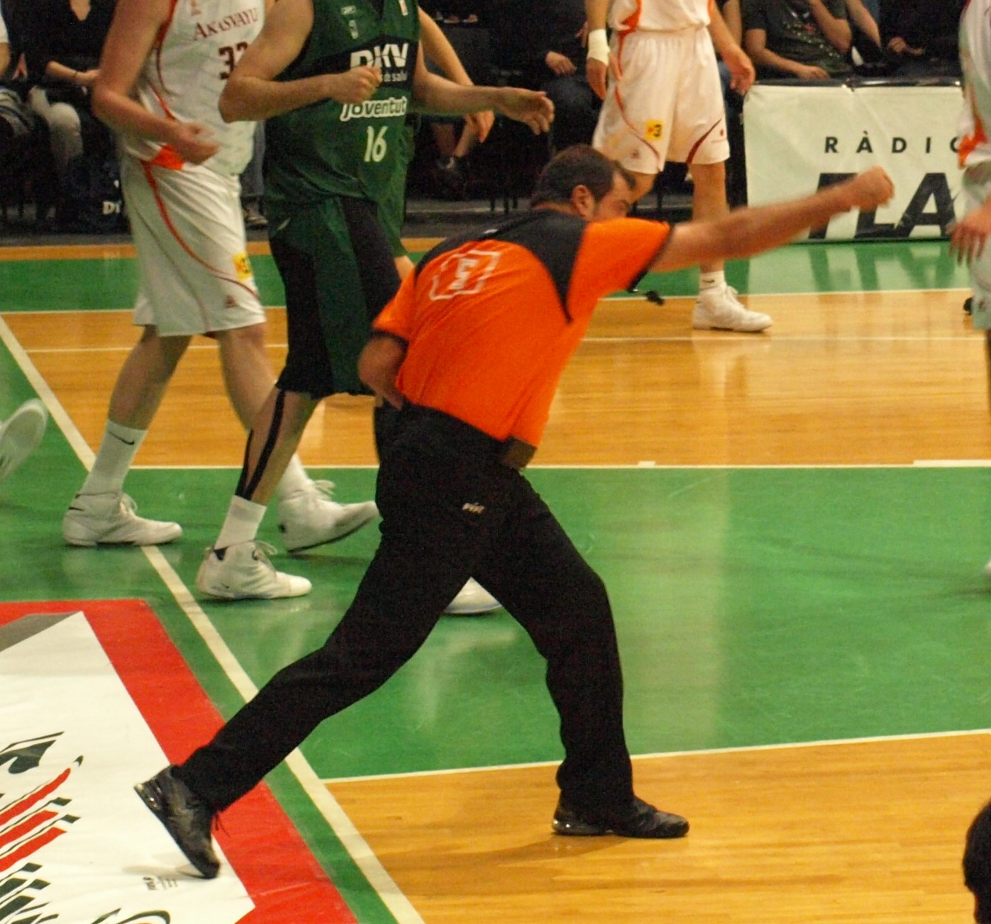 Árbitro señalando personal en ataque en un partido de la liga ACB